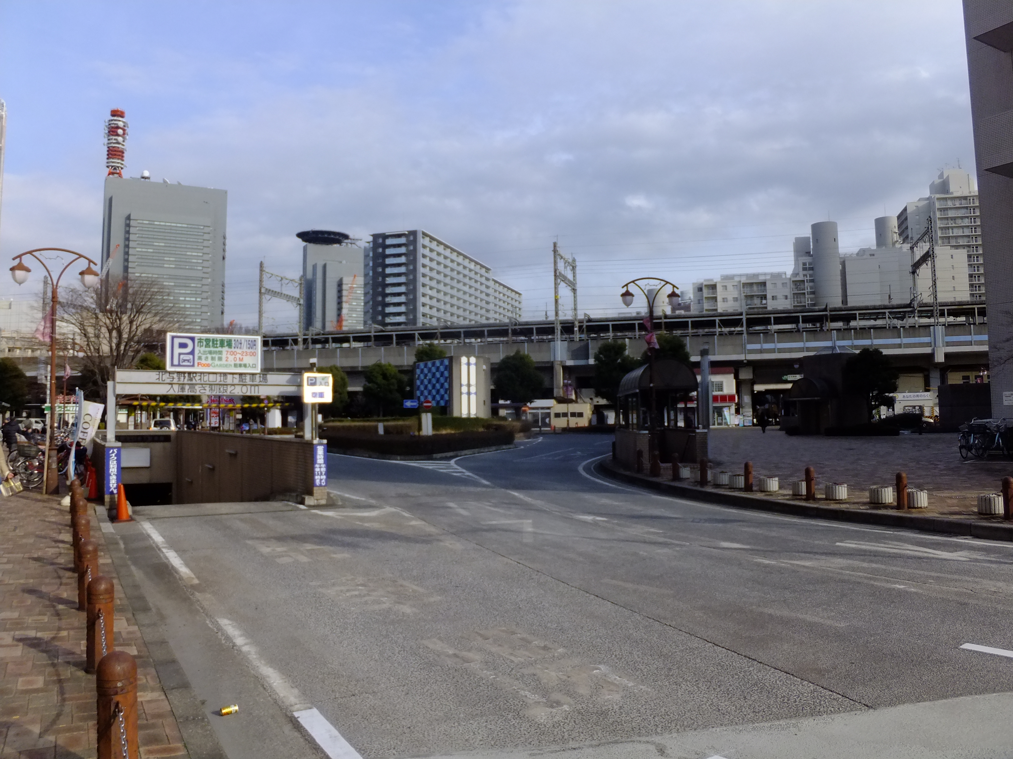 埼京線・北与野駅北口ロータリー